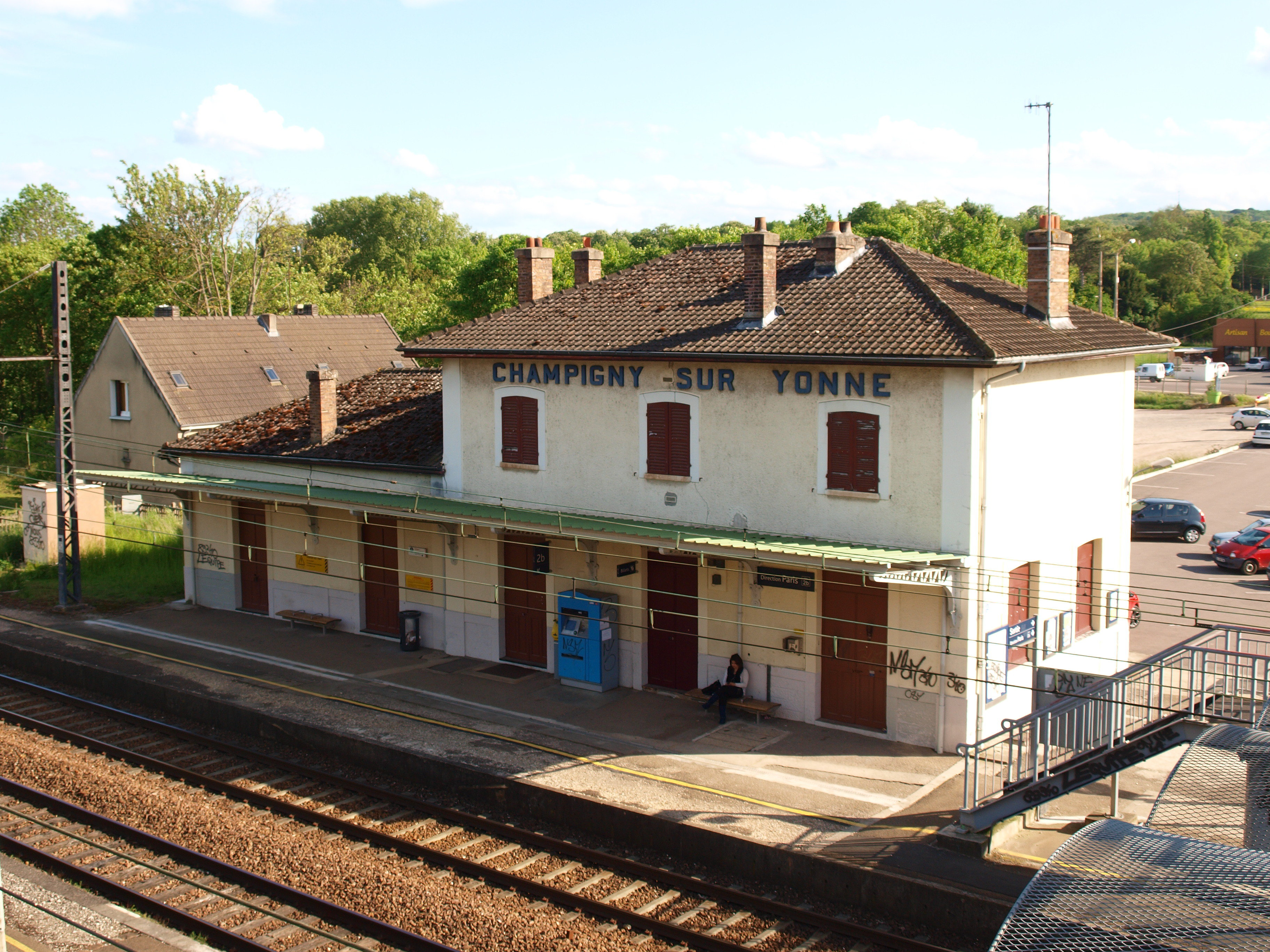 Champigny (Yonne, France) ; la gare